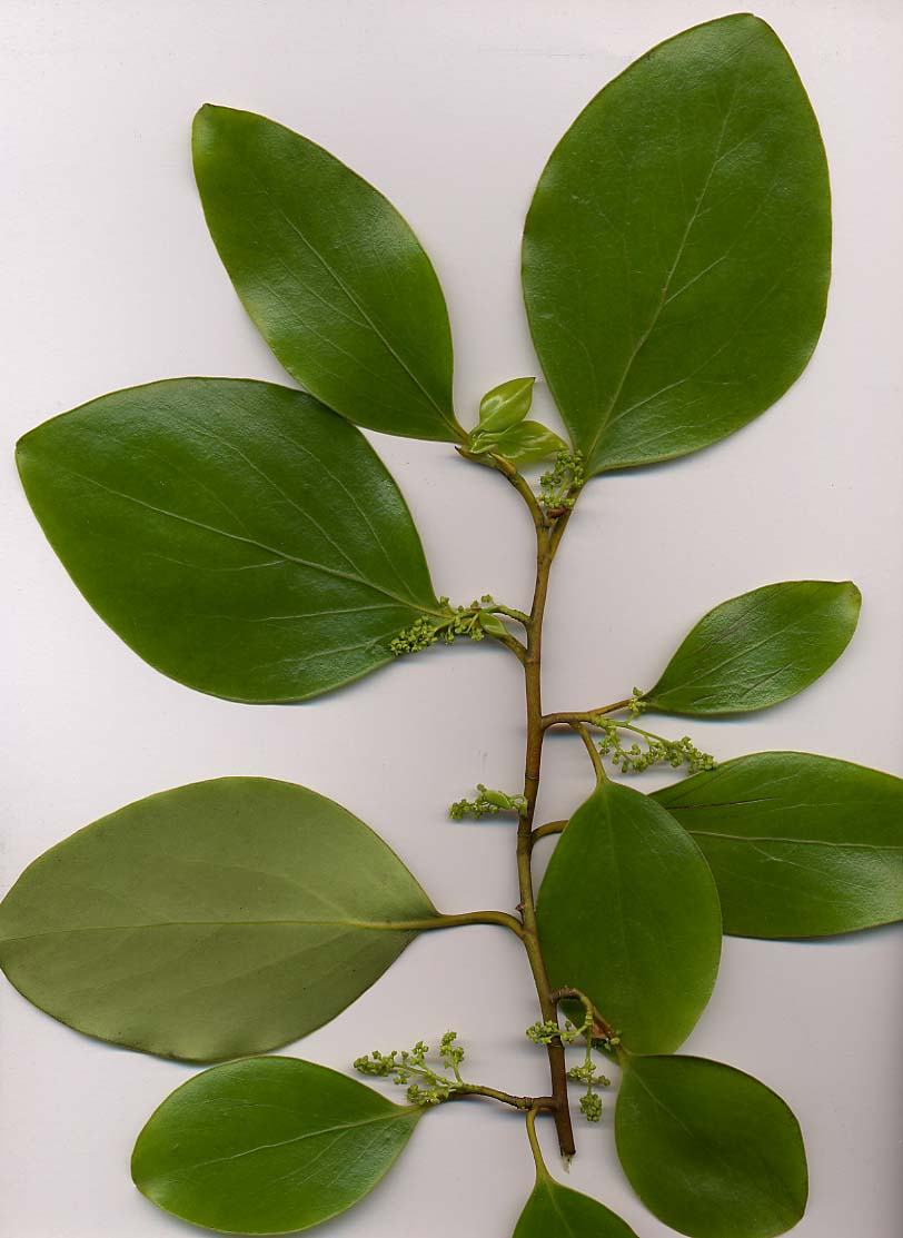 Griselinia littoralis, Kapuka, Griseliniaceae, New Zealand